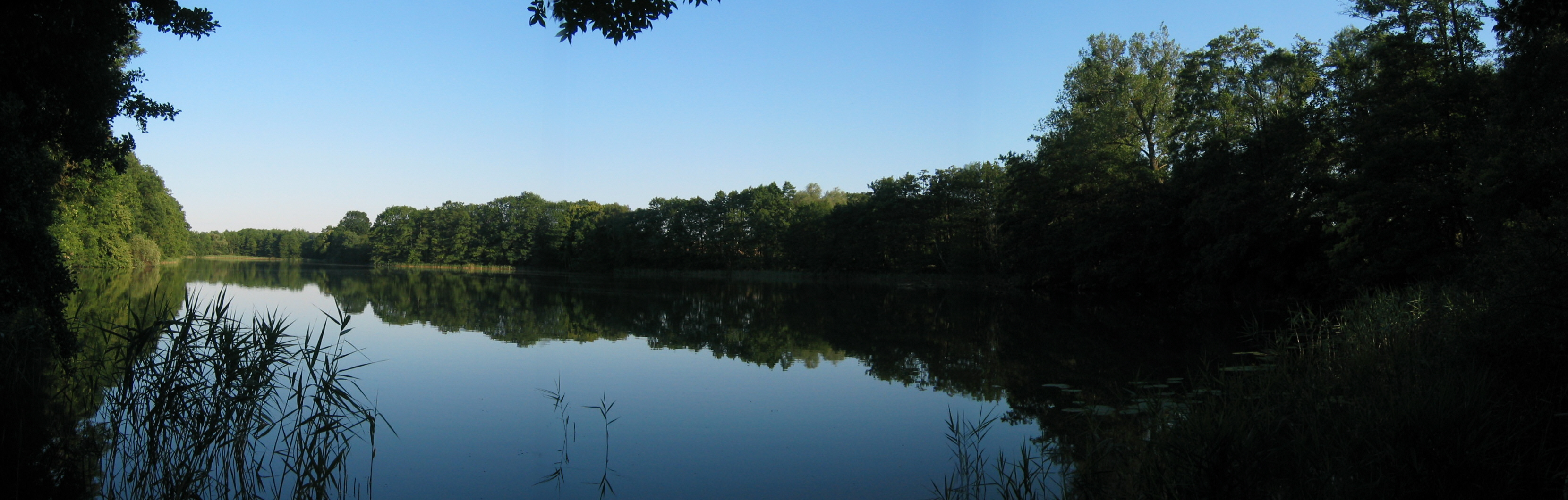 Plötzensee bei Pinnow und Fergitz in der Uckermark.